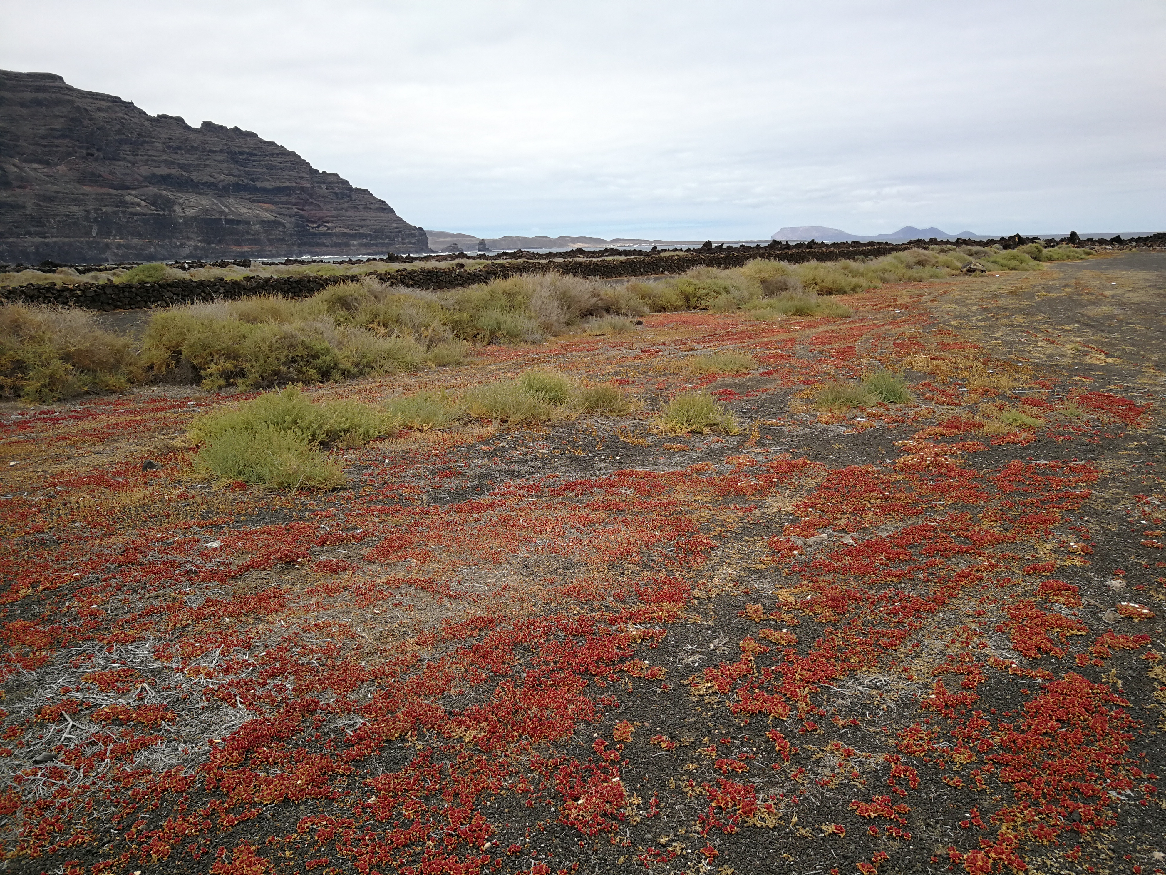 Rötliche Pflanzen im Vordergrund: Eiskraut